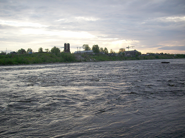 Река Кемь